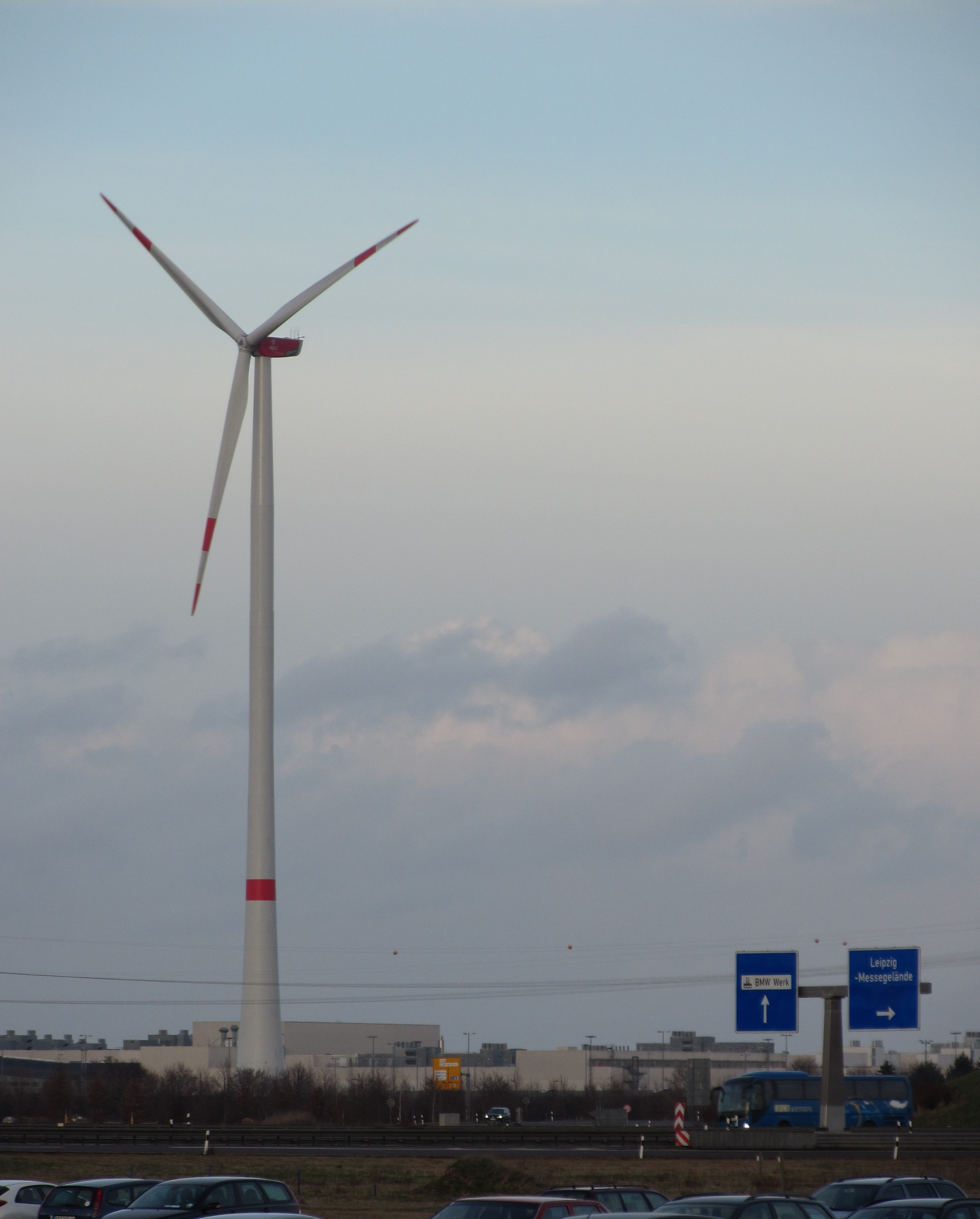 Windkraftanlage (WKA) in der Nähe der neuen Messe Leipzig (Nord)